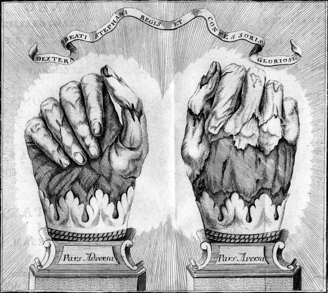 Szent István ereklyéje a Szent Jobb. A Szent Jobbról készült metszet Pray, Georgius: Dissertatio historico-critica de sacra dextera divi Stephani primi Hungariae regis. Vindobonae 1771. A középkor óta különös tiszteletnek örvendett. Hartvik püspök legendája szerint a Székesfehérvárott eltemetett Istvánnak épen maradt a jobb keze. Az eredeti ereklye az egész jobb kart magában foglalta a kézzel együtt.